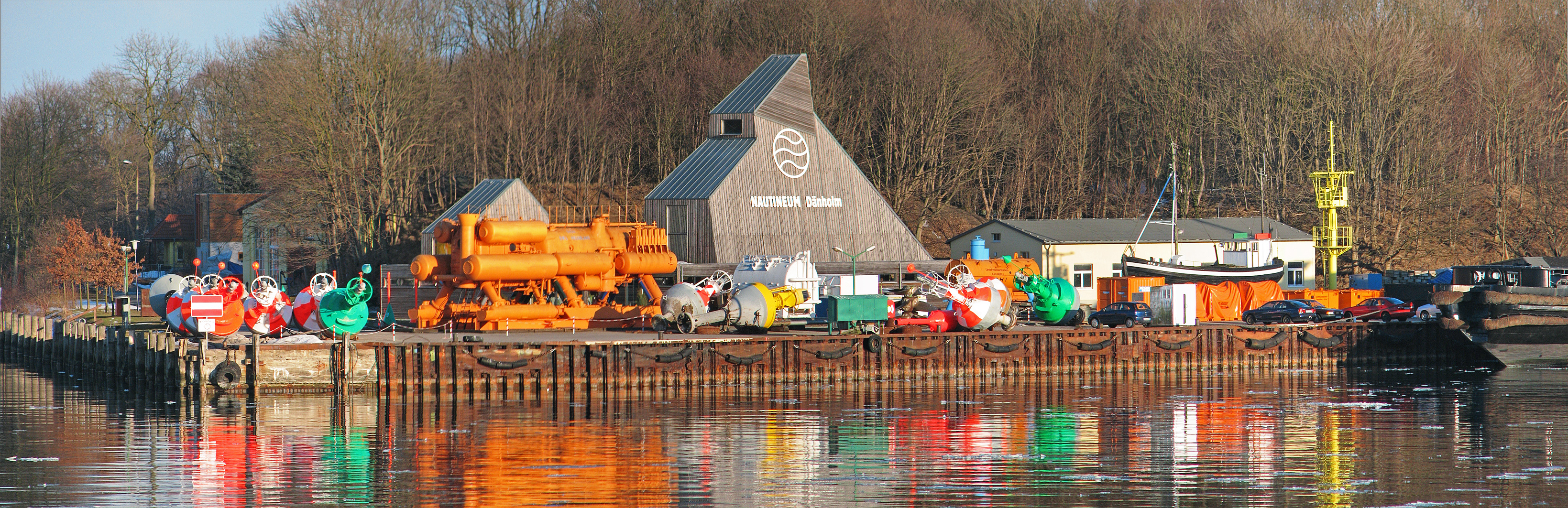 Beschreibung: Nautineum, part of the german Meeresmuseum situated on the Dänholm - near Stralsund / Germany Fotograf: Darkone, 24. März 2006